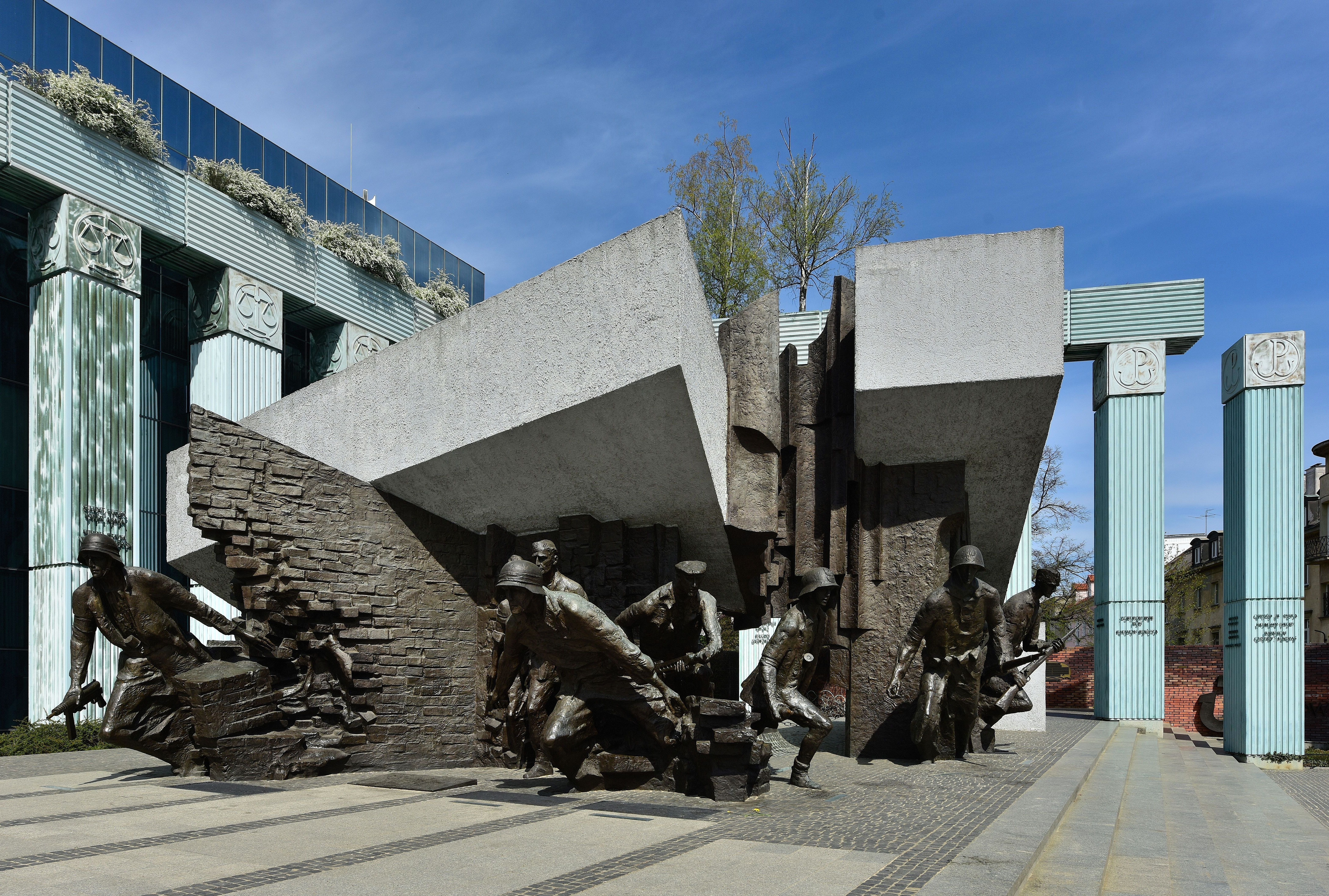 Pomnik Powstania Warszawskiego w Warszawie